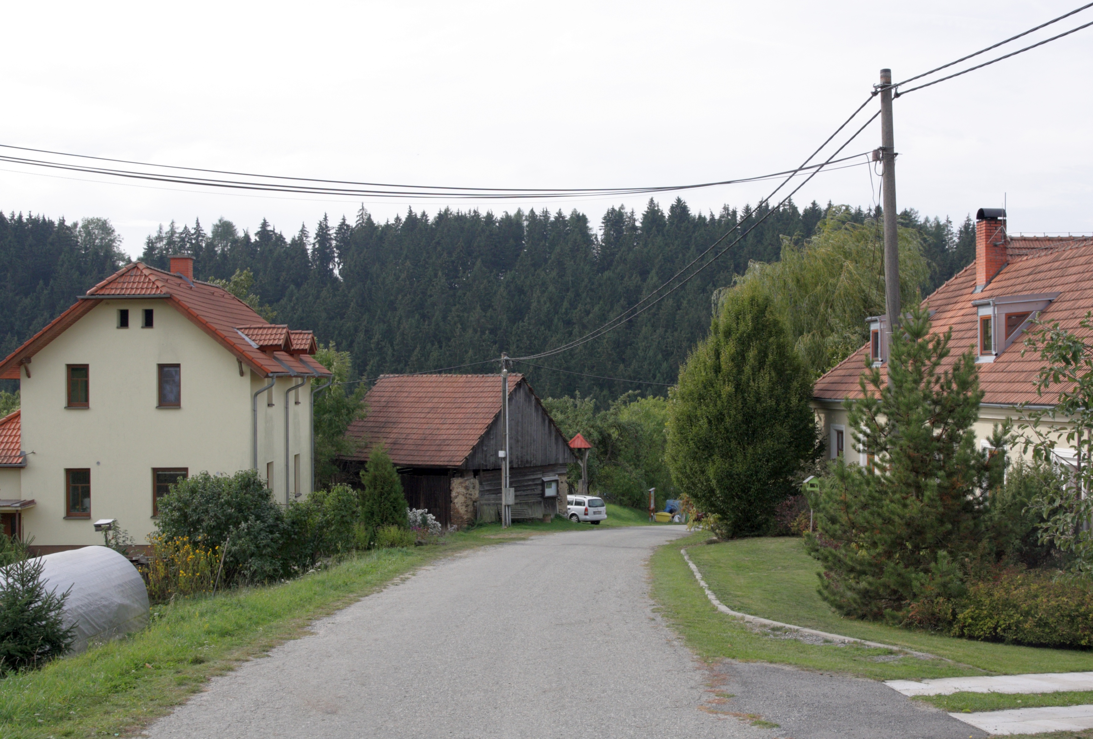 Habří (Moravecké Pavlovice) - hlavní ulice.